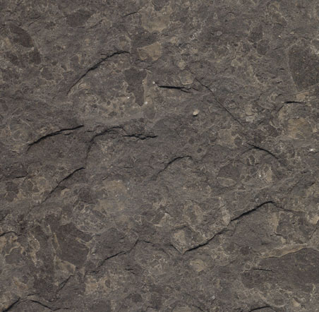 Jura-Ölschiefer aus Holzmaden, naturgespalten